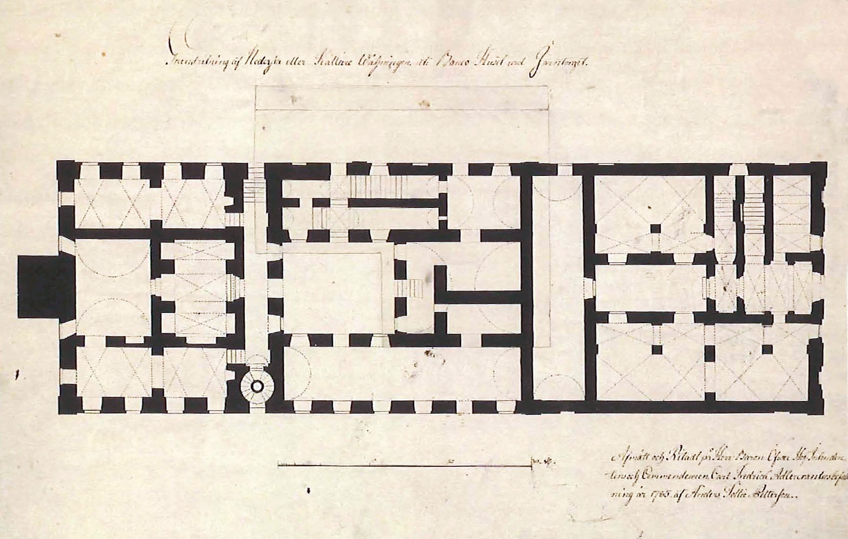 Planritning som redovisar förändringarna i hus 2 efter ombyggnaden 1785. Ritning av Anders Tottie Pettersson.